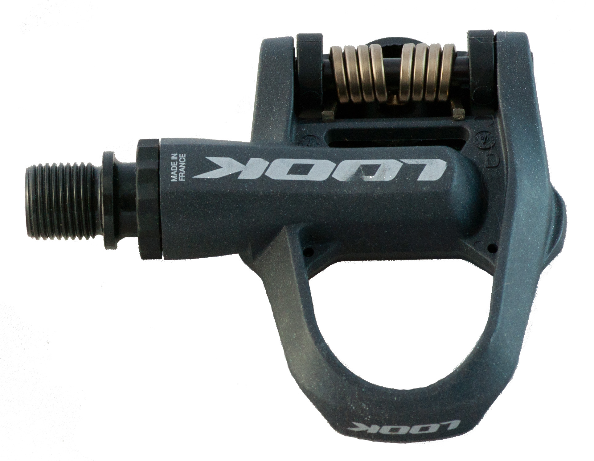 Pédale automatique Look, avant vu de dessus.